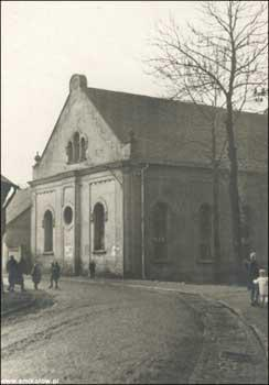 Synagoge in Mikolow